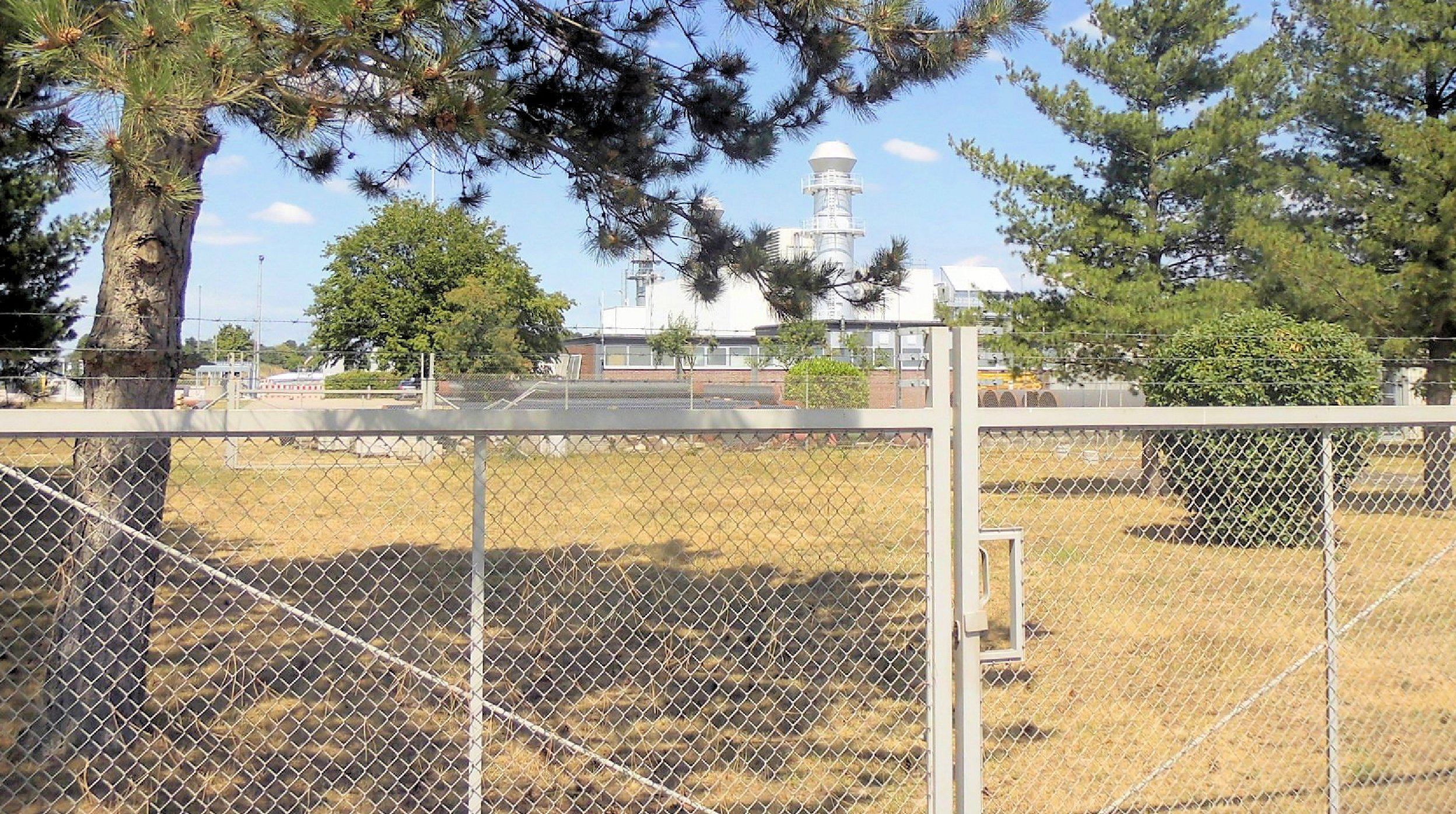 Erdgas-Verdichterstation in Hügelheim